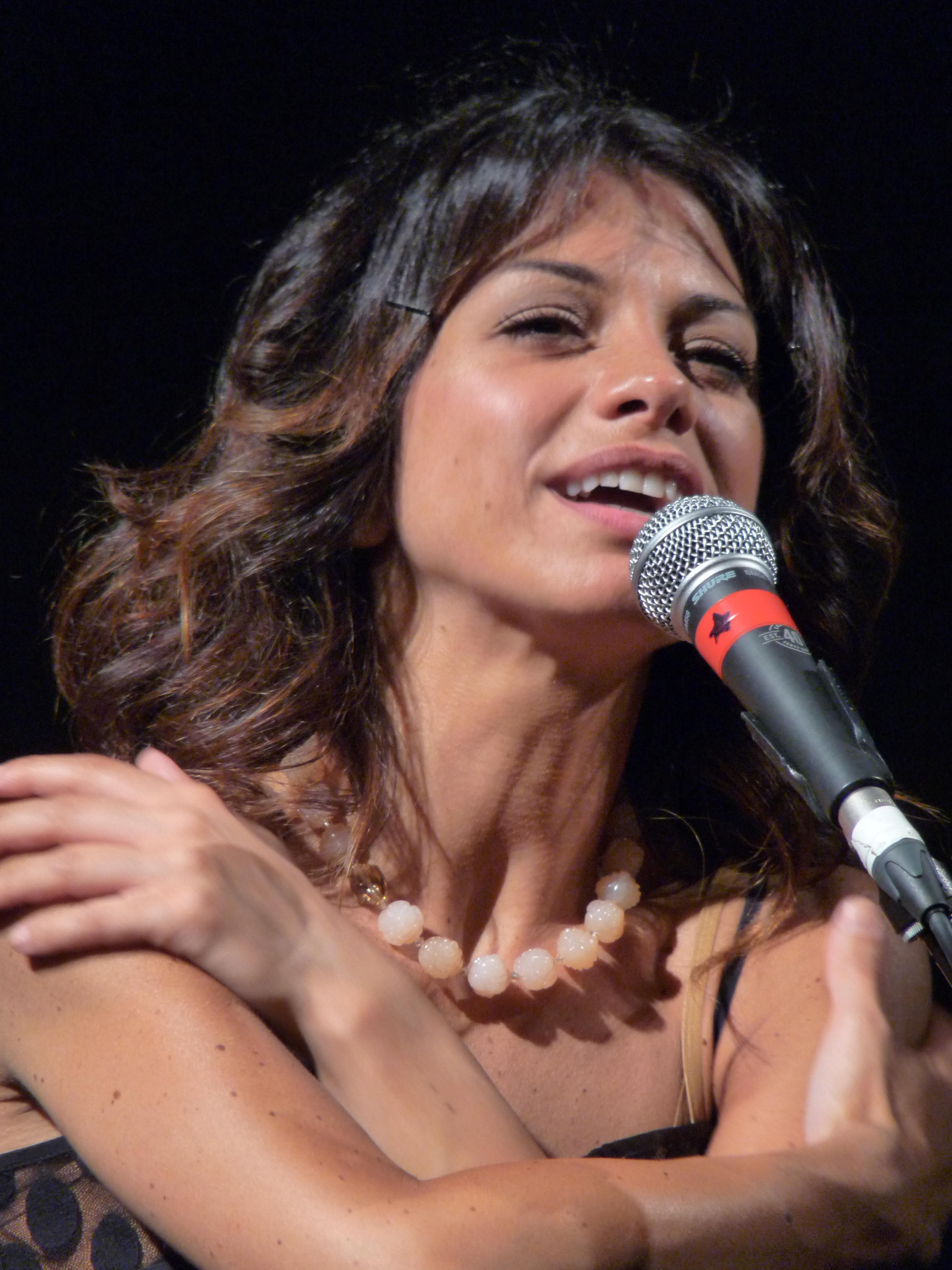 Dolcenera in concerto a Sanremo!!!